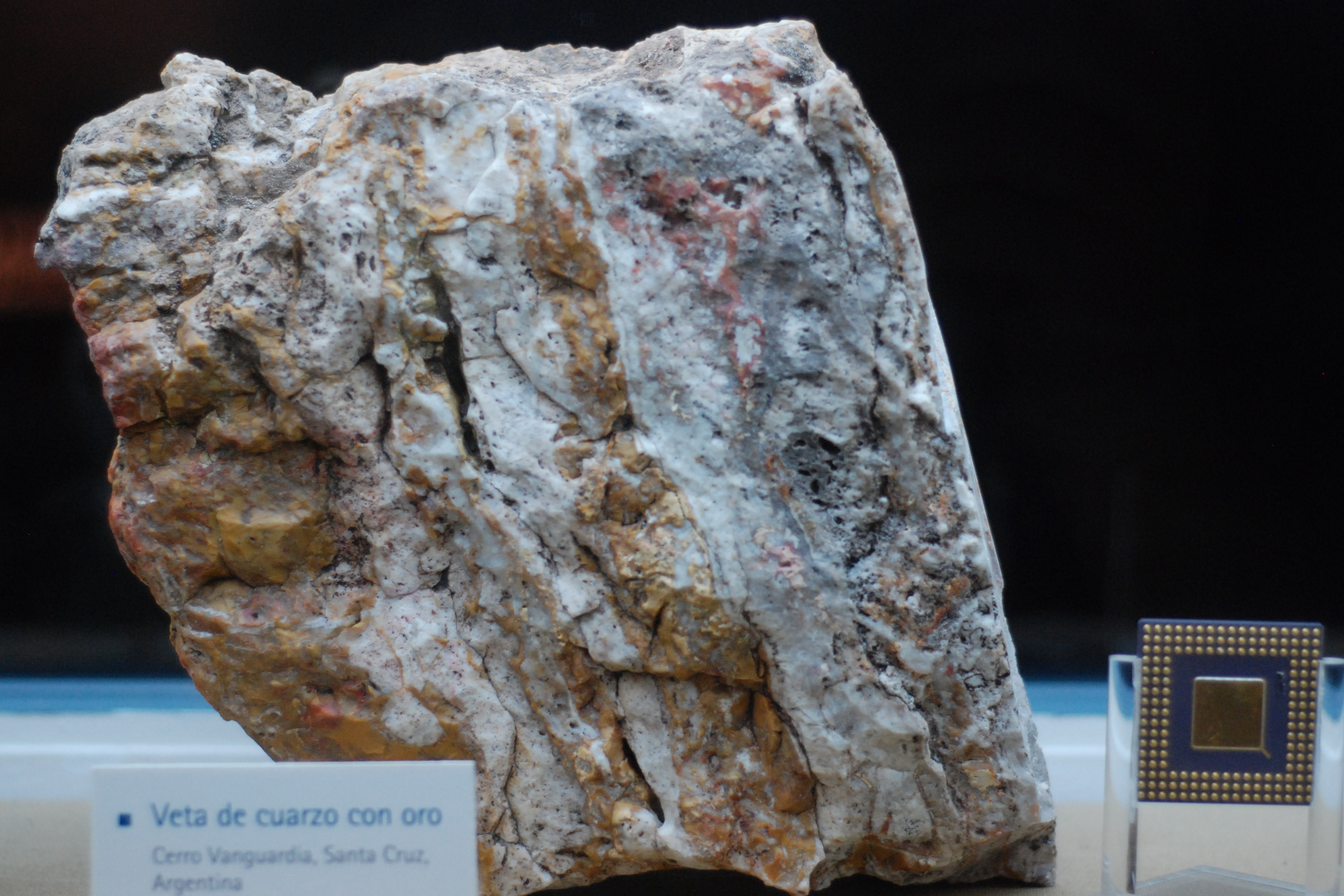 Veta de cuarzo con oro. Contiene 10 g de oro por tonelada Cerro Vanguardia, Santa Cruz, Argentina.